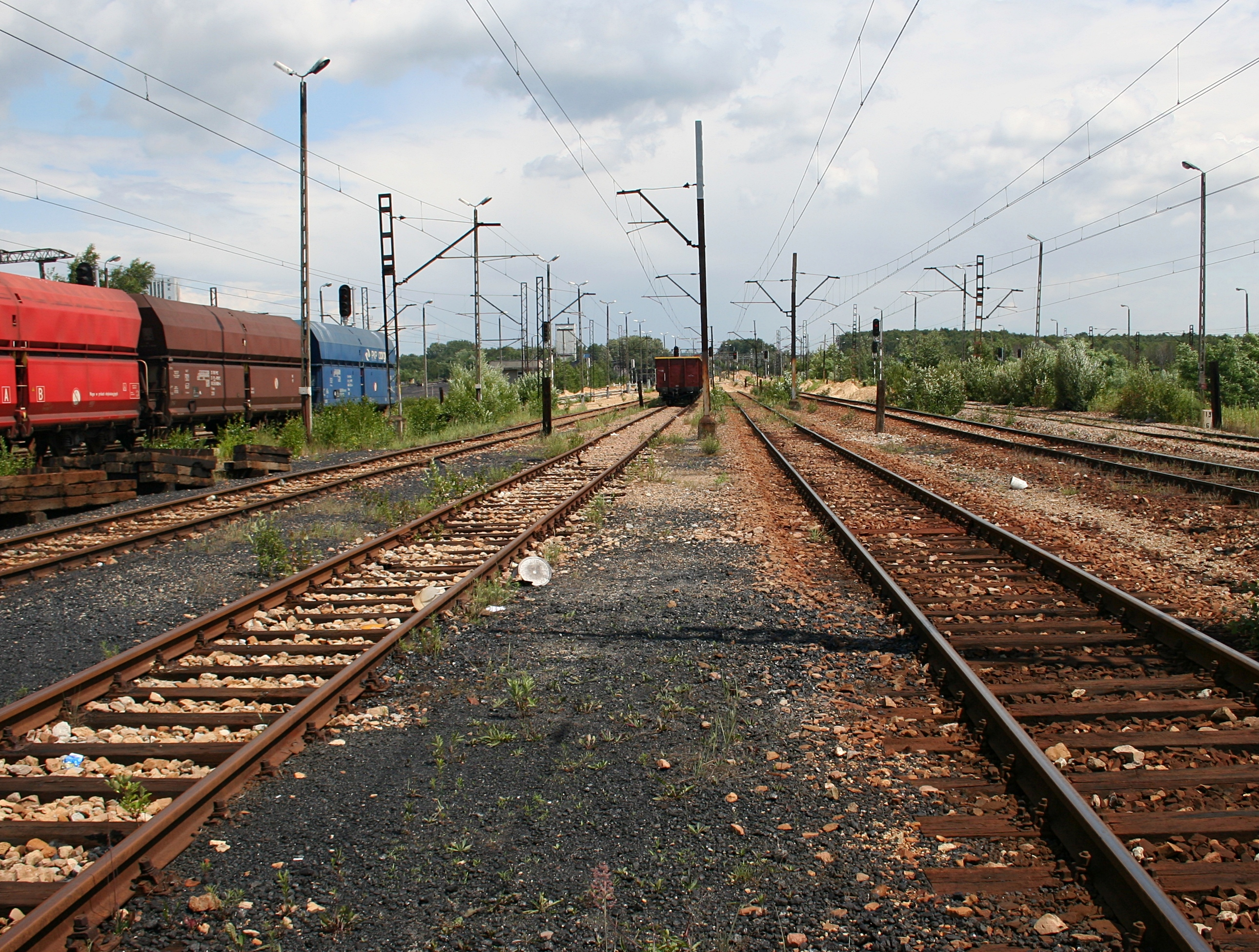 Linia kolejowa nr 141 w pobliżu dawnej stacji Ruda Bielszowice